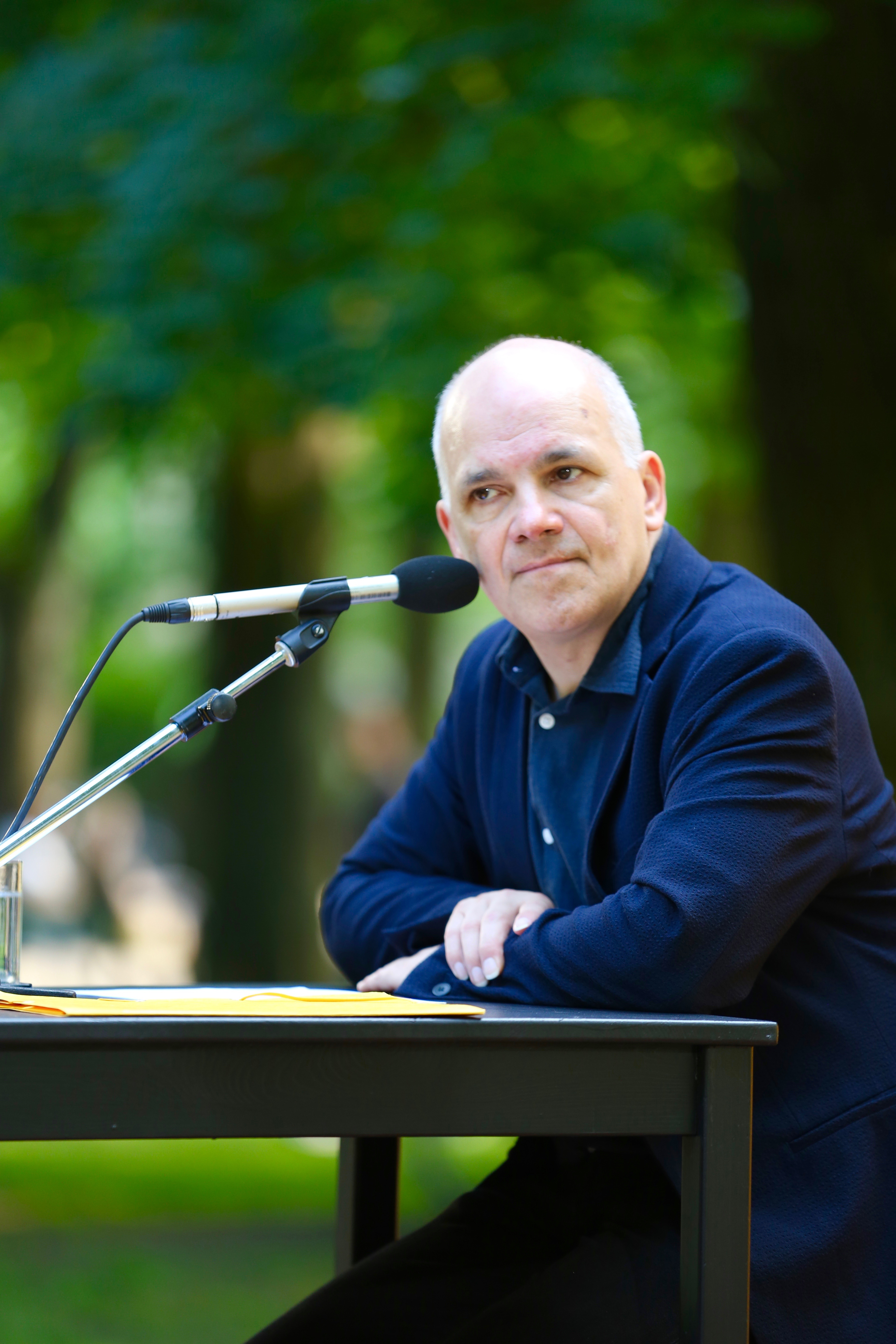 Der Schriftsteller Frank Witzel auf dem Erlanger Poetenfest 2017